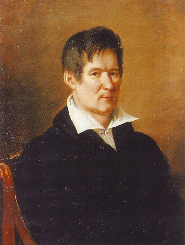 Портрет архитектора В.П.Стасова